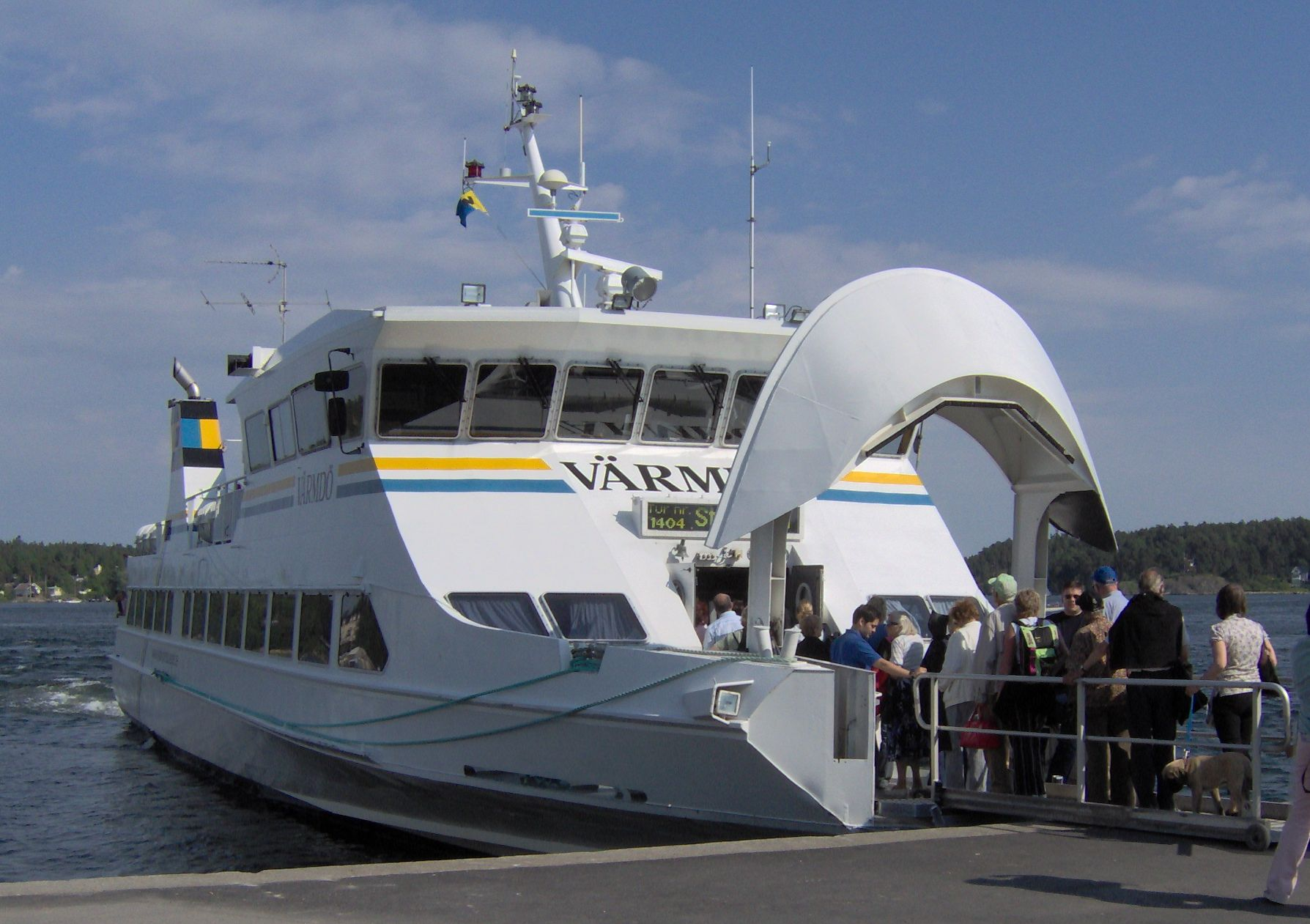 Waxholmsbolagets båt Värmdö i Waxholm. IMO number: 8900945 Callsign: SMXZ